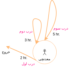 سوال دوم